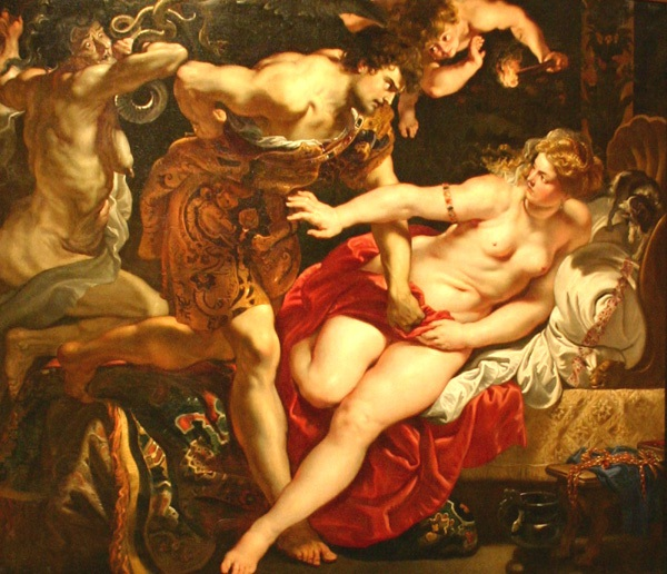 Репродукция картины Питера Пауля Рубенса "Тарквиний и Лукреция" ок. 1609-1611